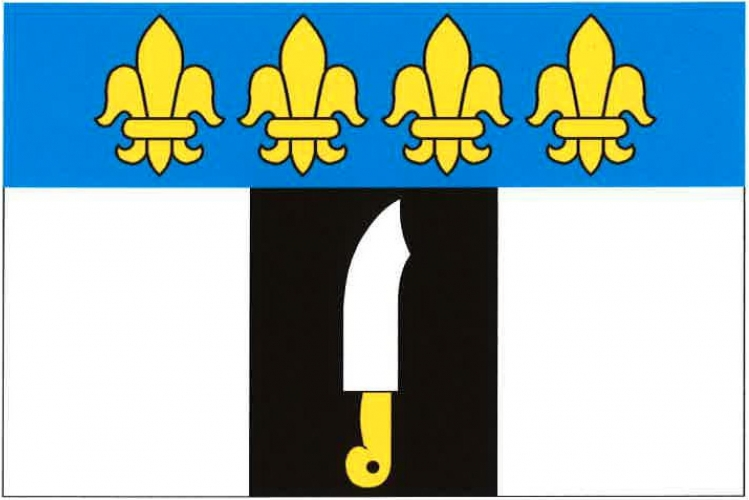 vlajka, Ošelín, okres Tachov